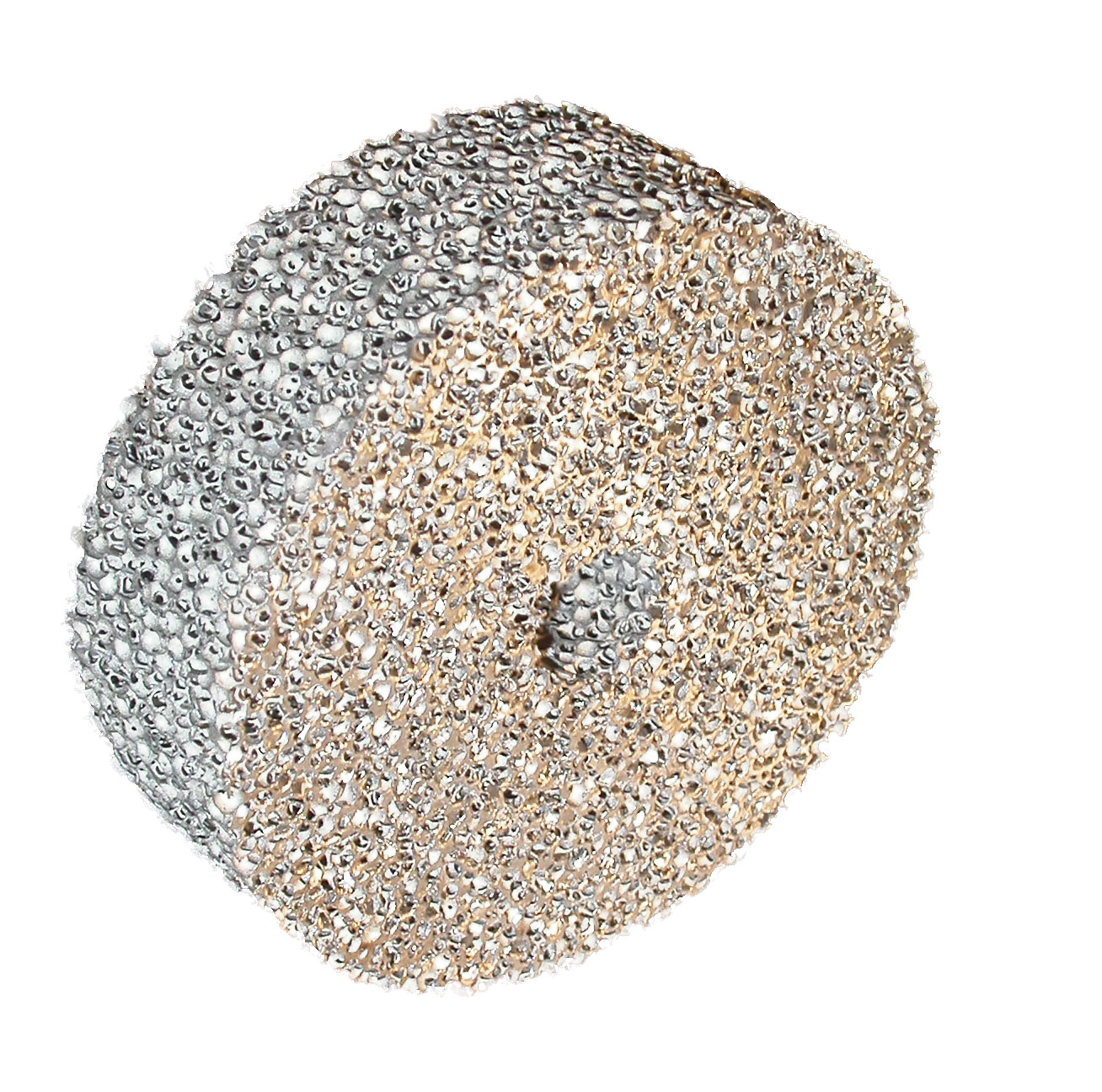 Ein Demo-Werkstück aus gesintertem Metall der Fa. Planesee